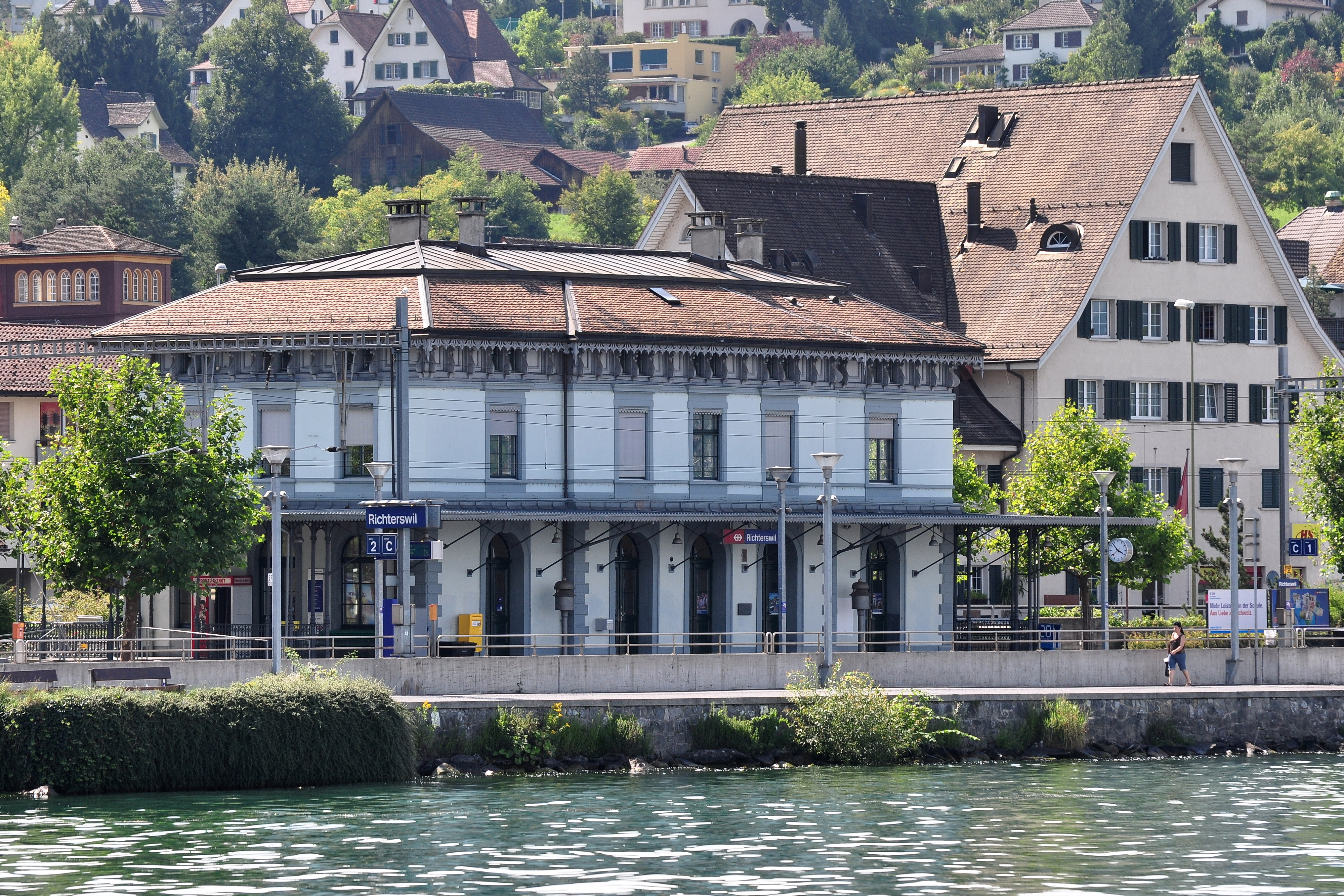 Bahnhof in Richterswil (Switzerland) as seen from Zürichsee-Schifffahrtsgesellschaft (ZSG) motorship Helvetia